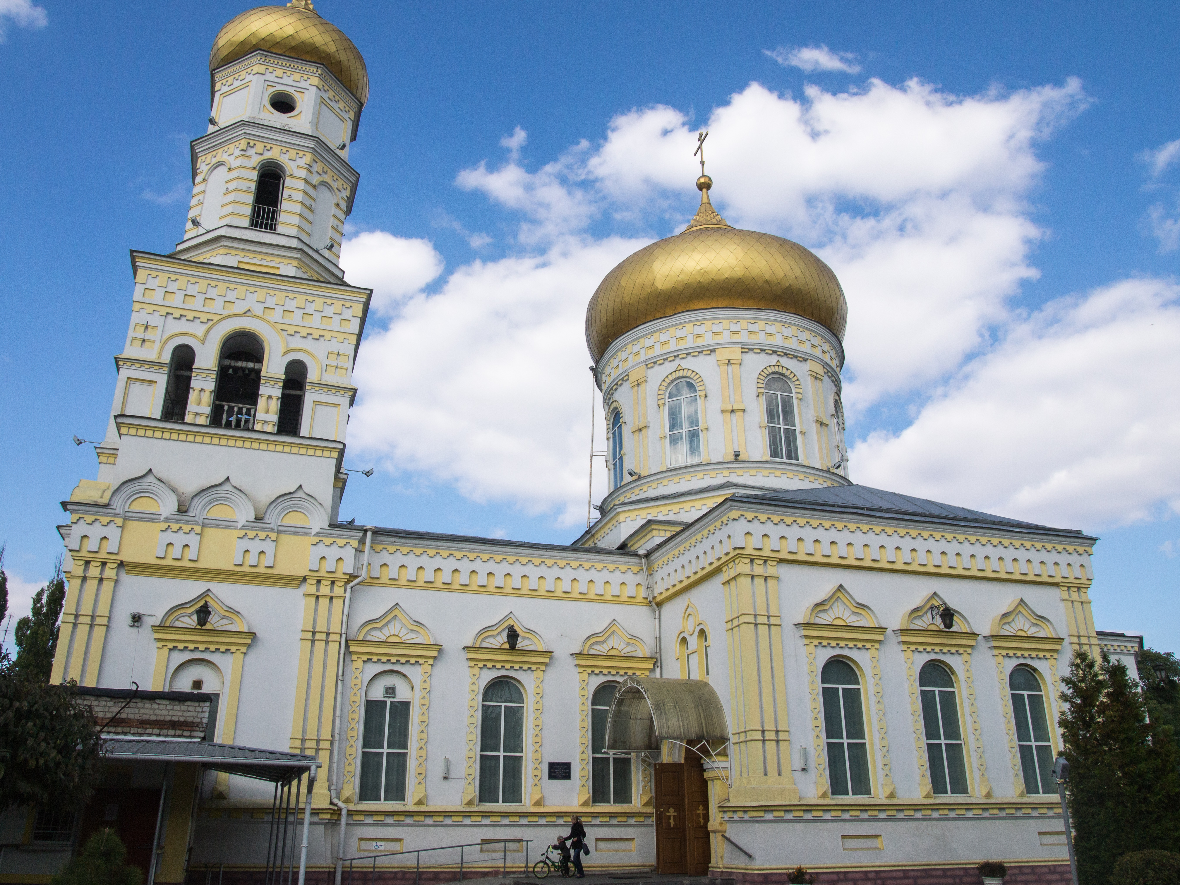 Троїцька церква, Собор Нерукотворного Спаса, Павлоград, пров. Голубицького